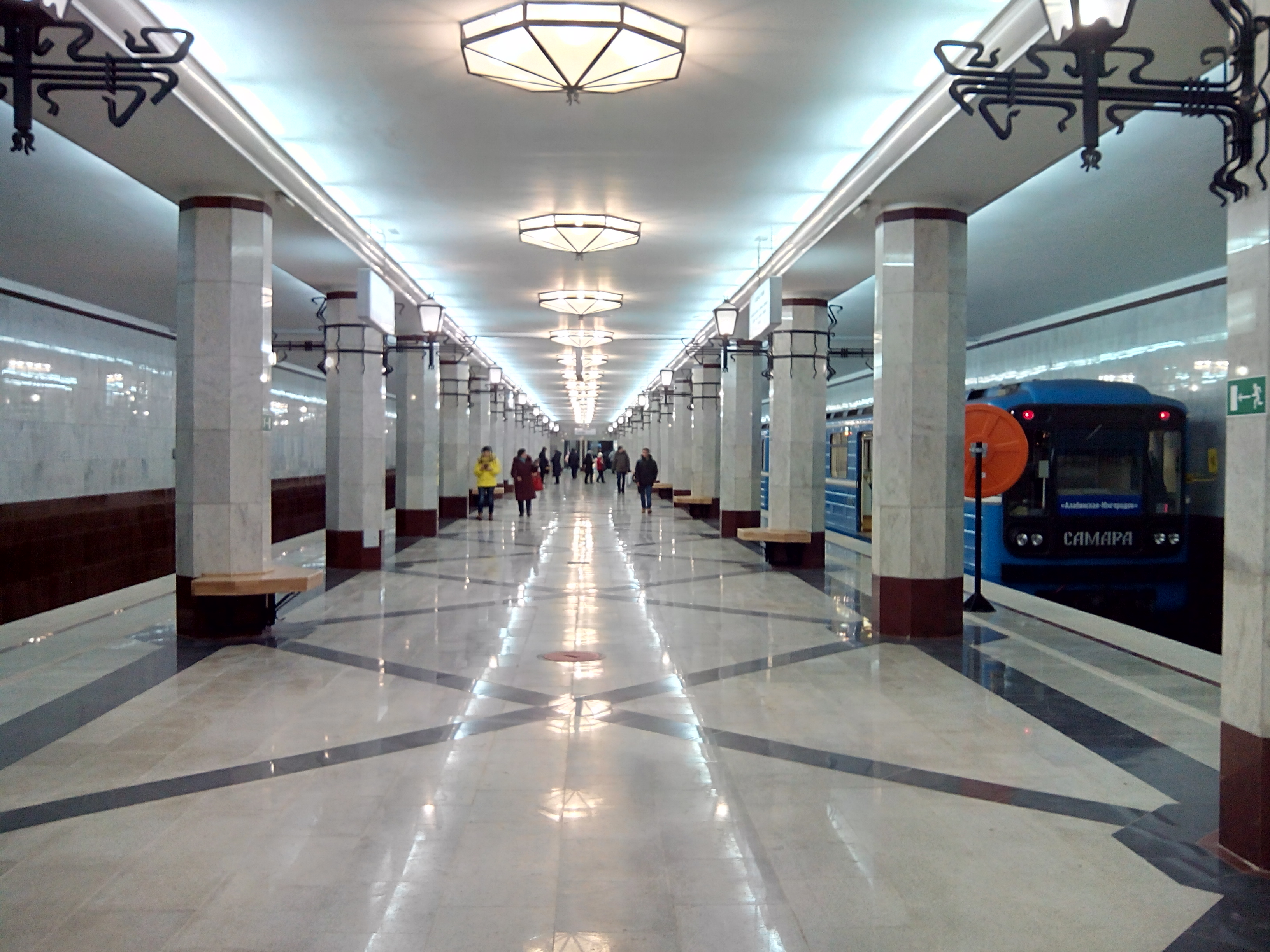 Станция метро "Алабинская" Самарского метрополитена